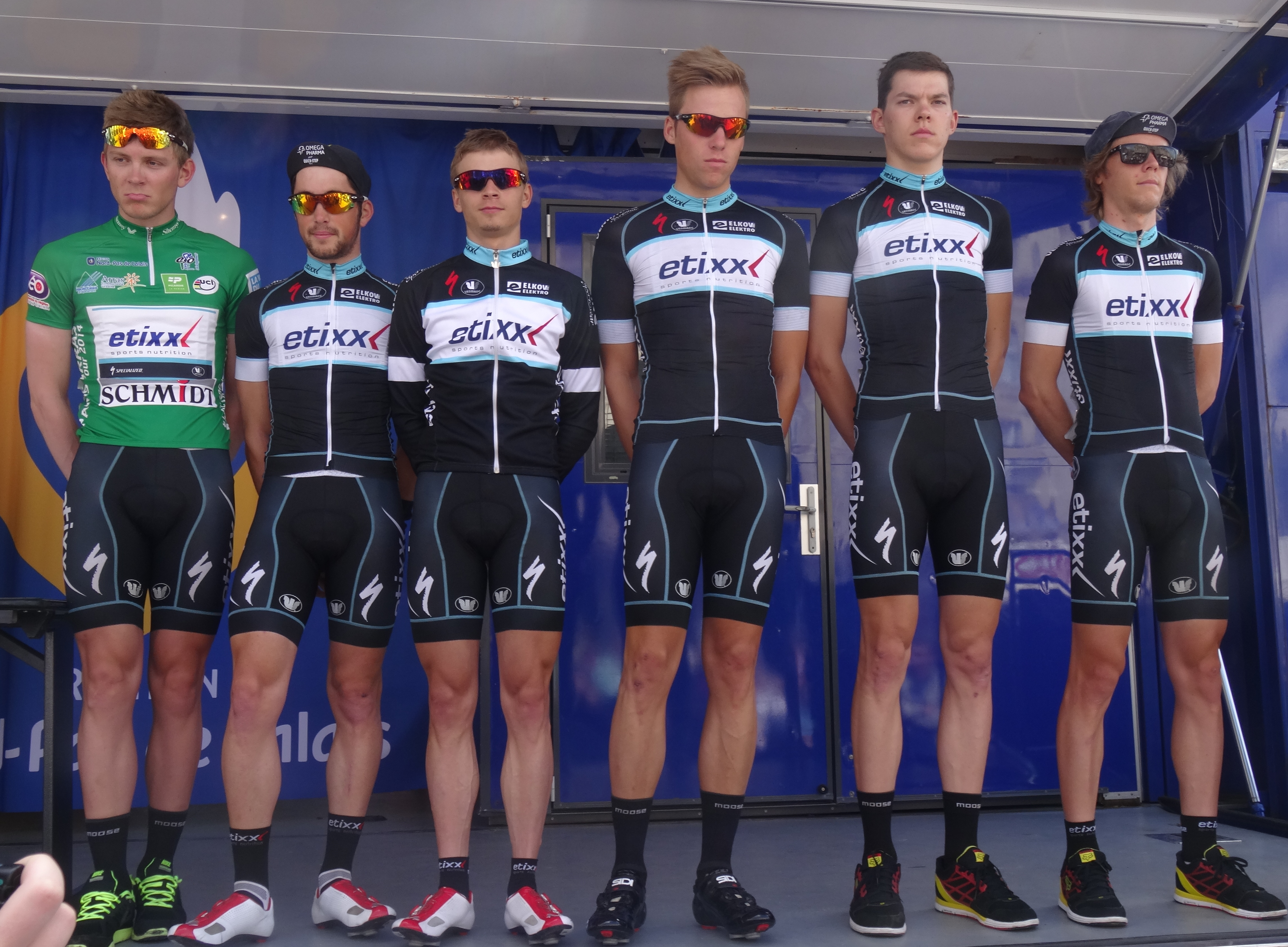 Reportage photographique réalisé le dimanche 25 mai 2014 à l'occasion du départ et de l'arrivée de la troisième étape du Paris-Arras Tour 2014 à Arras, Pas-de-Calais, Nord-Pas-de-Calais, France. Depicted people: Daniel Hoelgaard, Alexis Guérin, Karel Hník, Tim Kerkhof, Radovan Doležel and Samuel Spokes Depicted team: Etixx